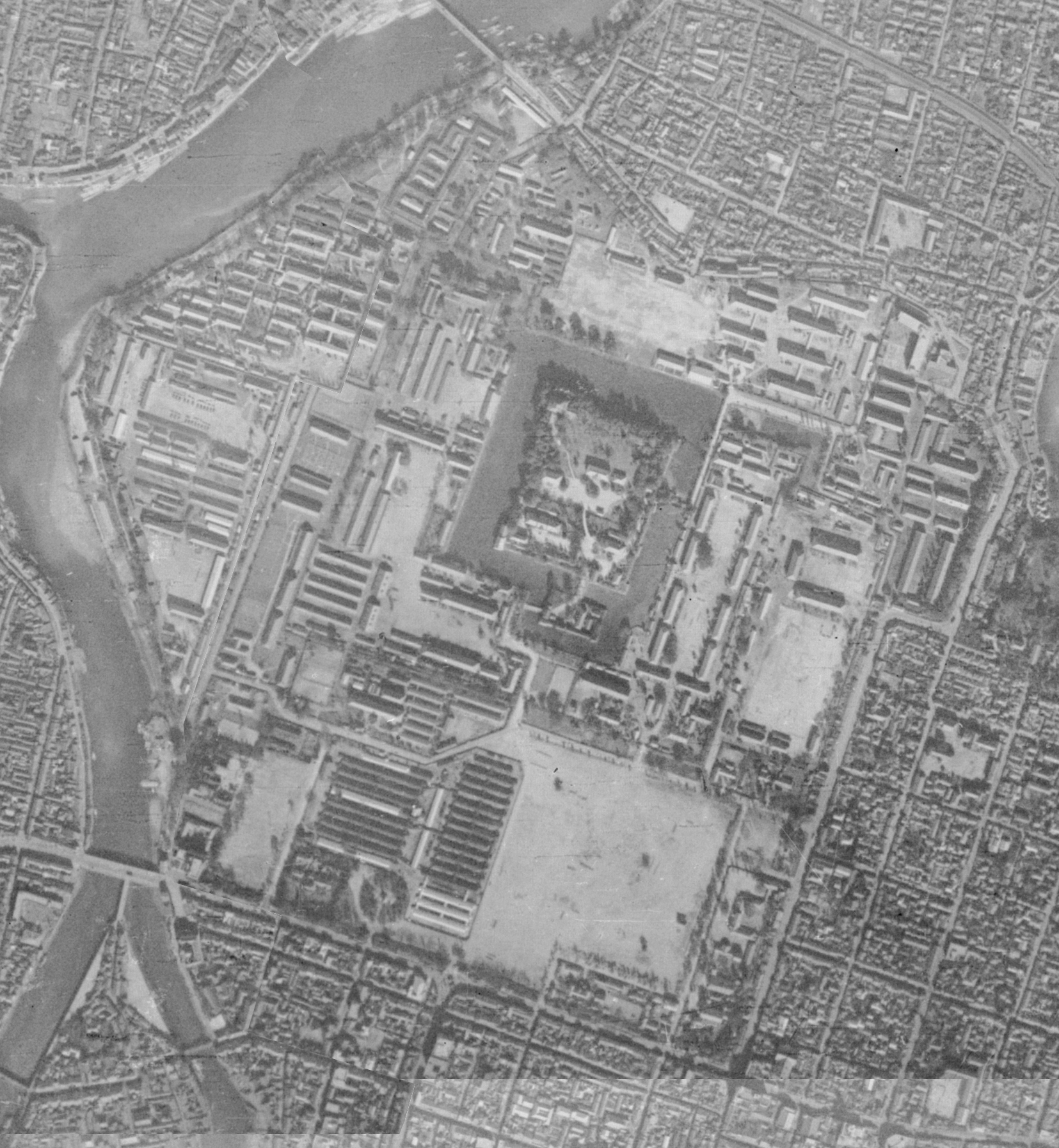 1939年広島市中区基町